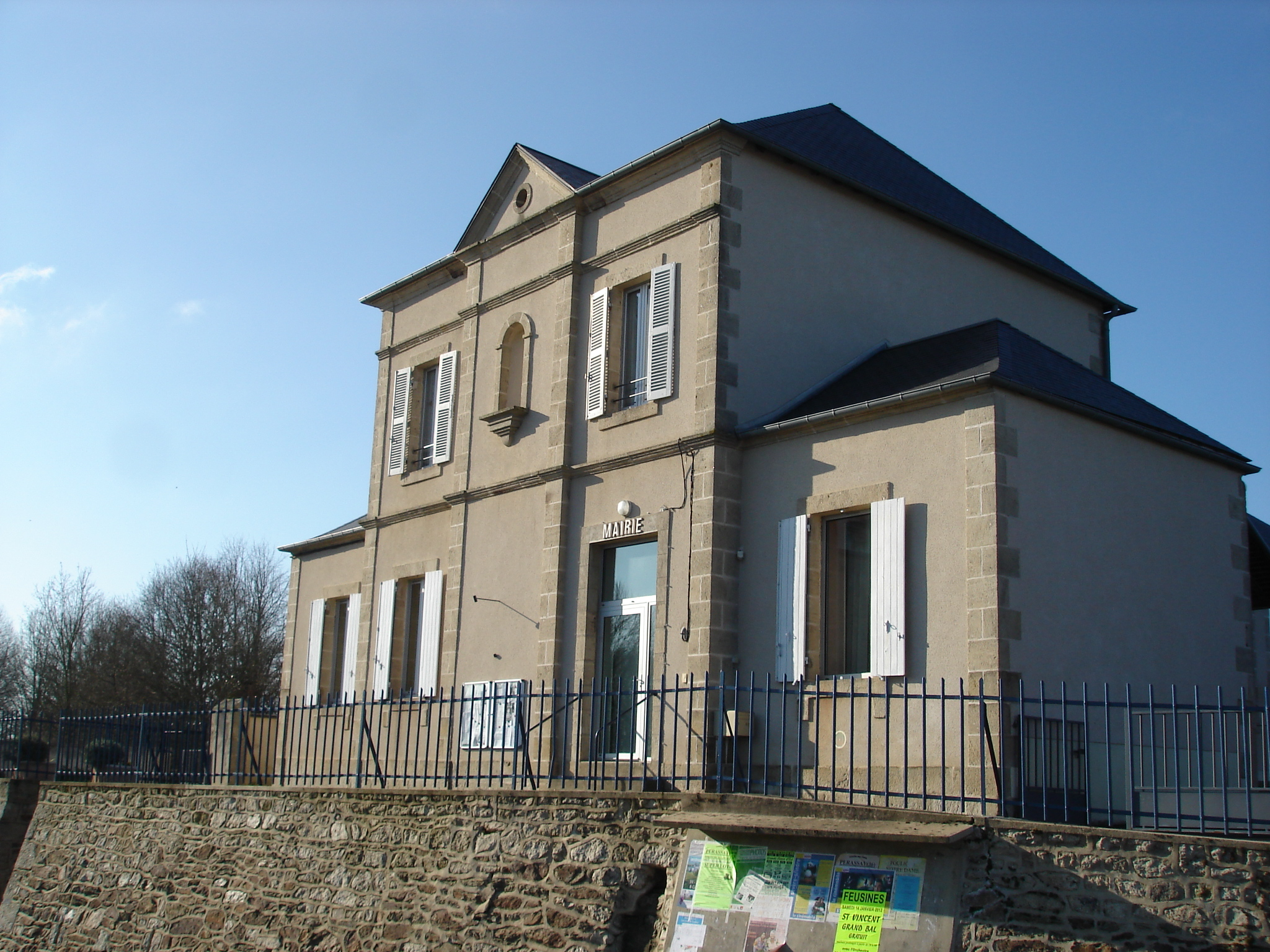 Lignerolles (36) : La mairie.